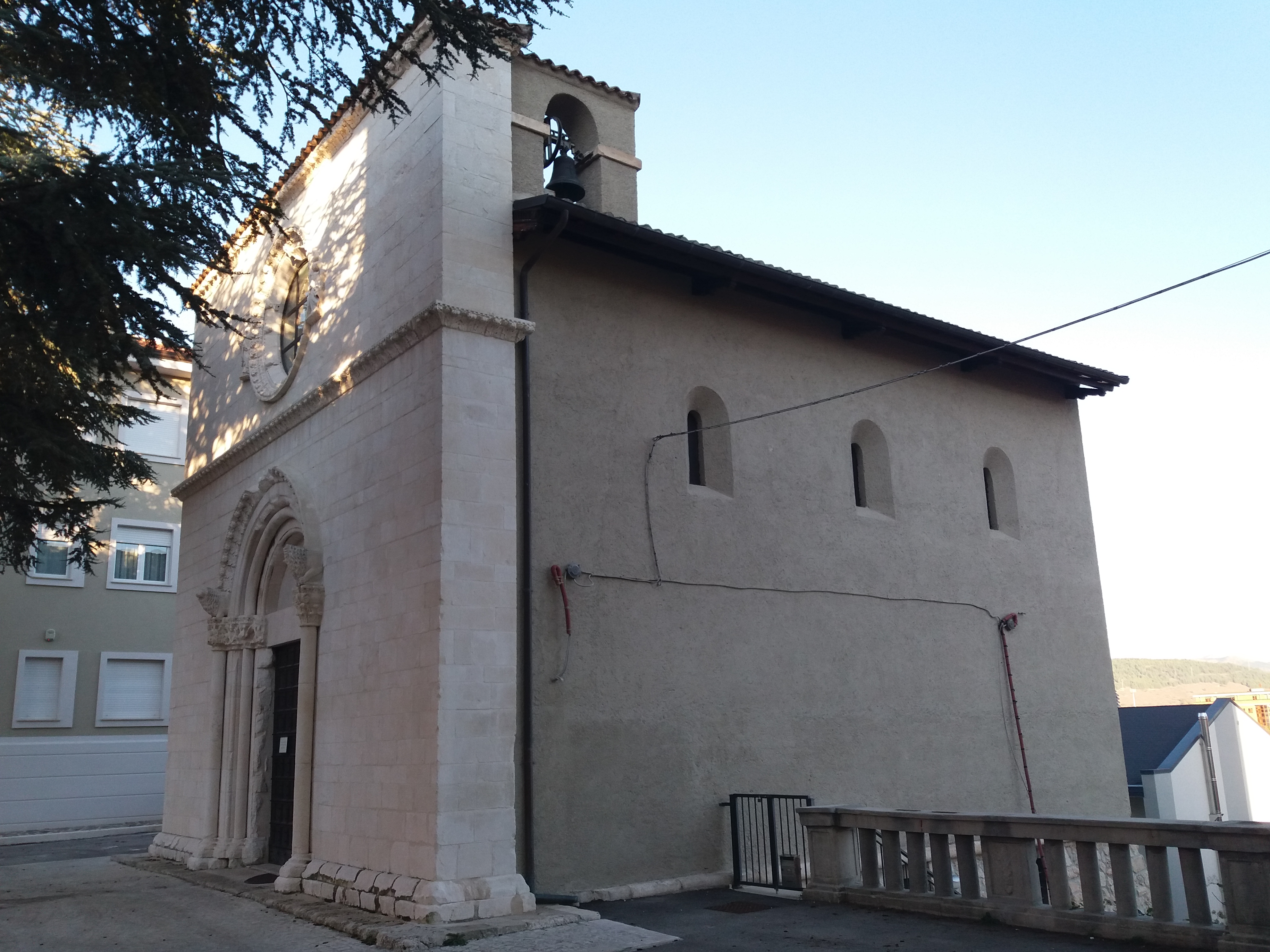 L'Aquila: Chiesa di Santa Maria di Forfona